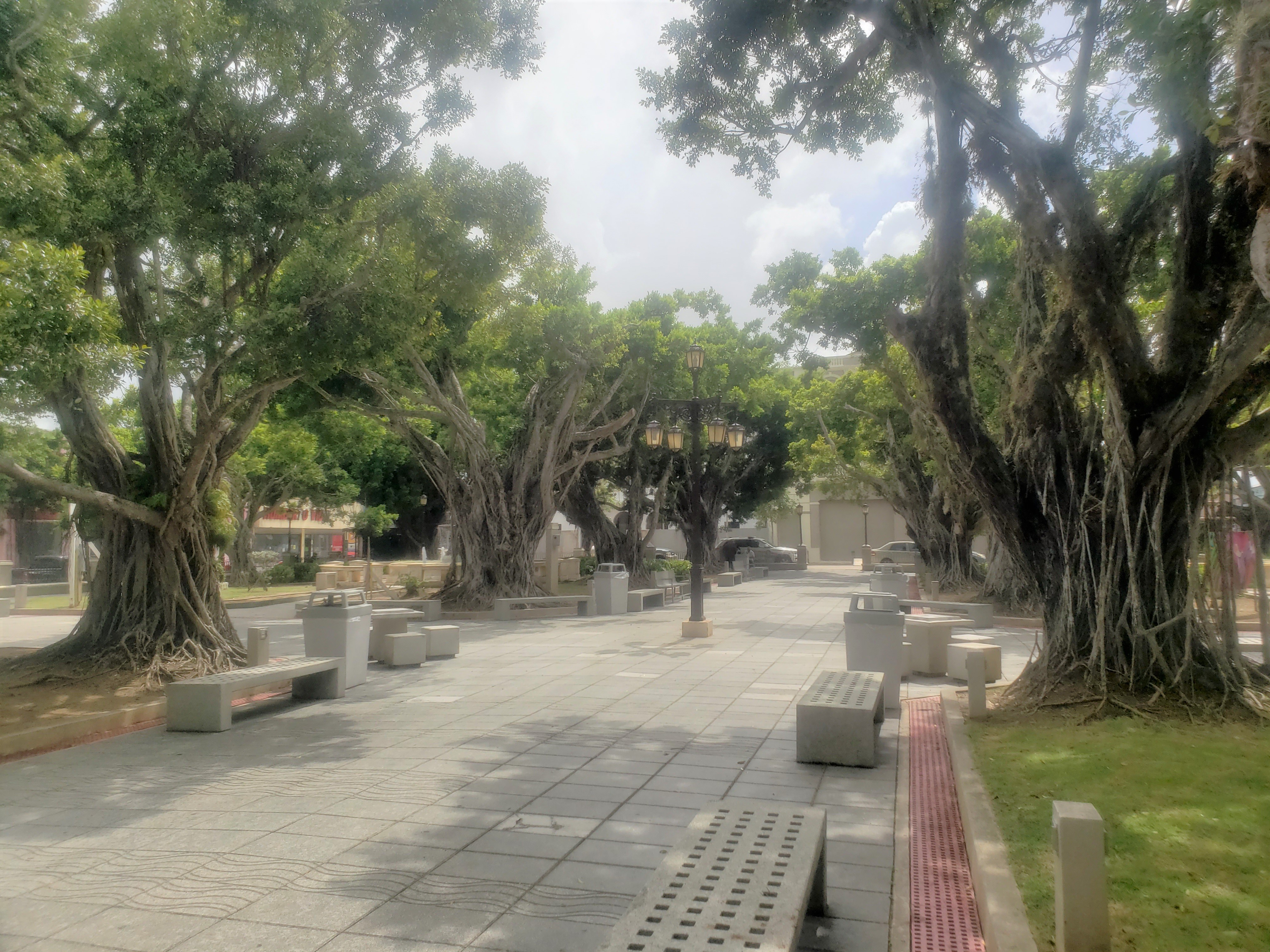 Plaza de recreo de Humacao, Puerto Rico